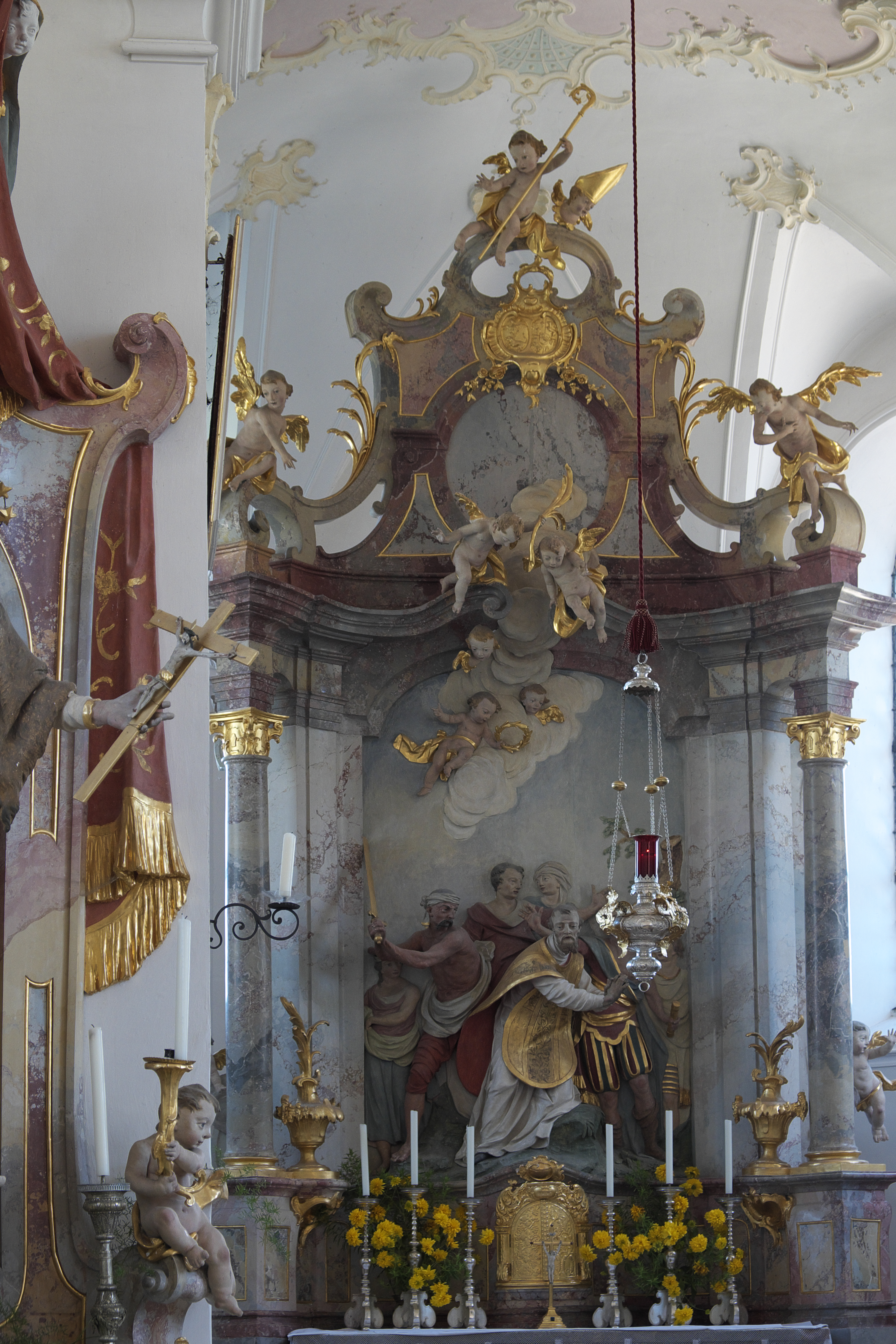 Katholische Filialkirche St. Alban in Dießen am Ammersee im Landkreis Landsberg am Lech (Bayern/Deutschland), Hauptaltar